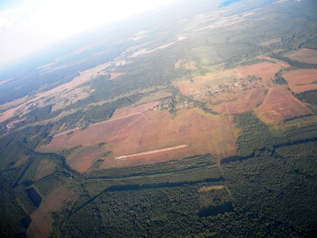 Район аэродрома "Суховка" с высоты 1000м. Лето 2011г.